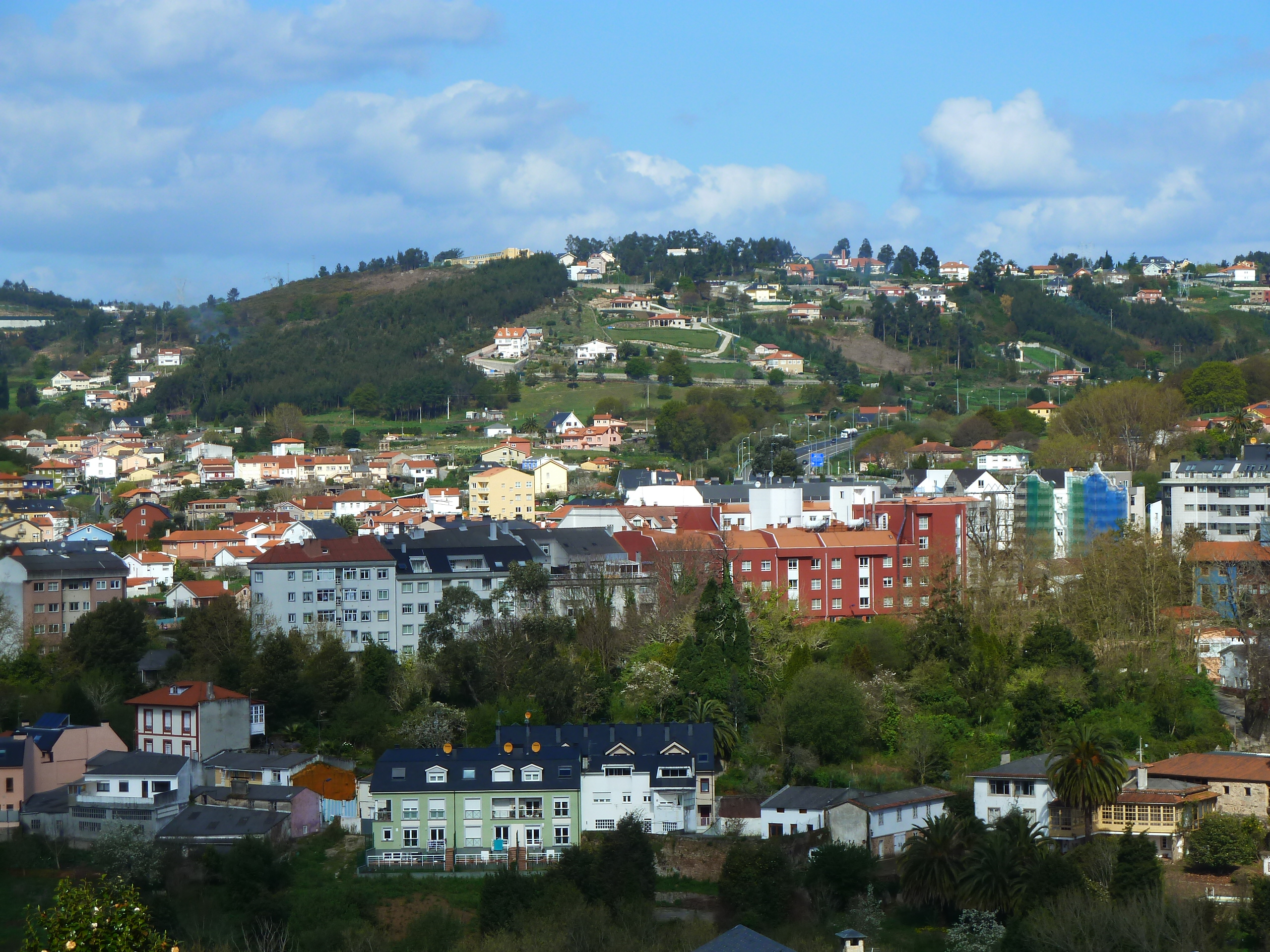 Vista xeral do lugar de Vilaboa, parroquia de Rutis, no concello de Culleredo.